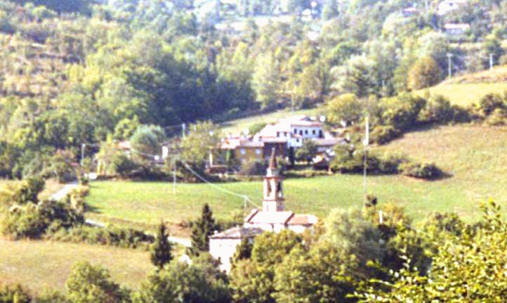 opera propria, foto, la frazione di Dezza - Comune di Bobbio - Piacenza - Val Trebbia, licenza libera